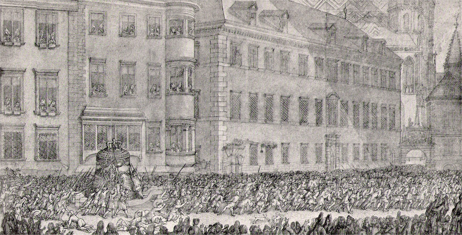 Die Überführung der grossen Josephinischen Glocke ("Pummerin") nach St. Stephan am 5. November 1711 in der Bischofgasse (heute Rotenturmstraße). Zeichnung von Ehrenberg, Sammlungen der Stadt Wien. Mit der Zeichnung und den darauf abgebildeten Gebäuden befasst sich näher: Emil Hütter: Die große Glocke bei St. Stephan zu Wien in: Berichte und Mittheilungen des Alterthums-Vereines zu Wien. Band XIII, Karl Gronemeyr, Wien 1873, S. 1–9 (Google Books über US-Proxy)